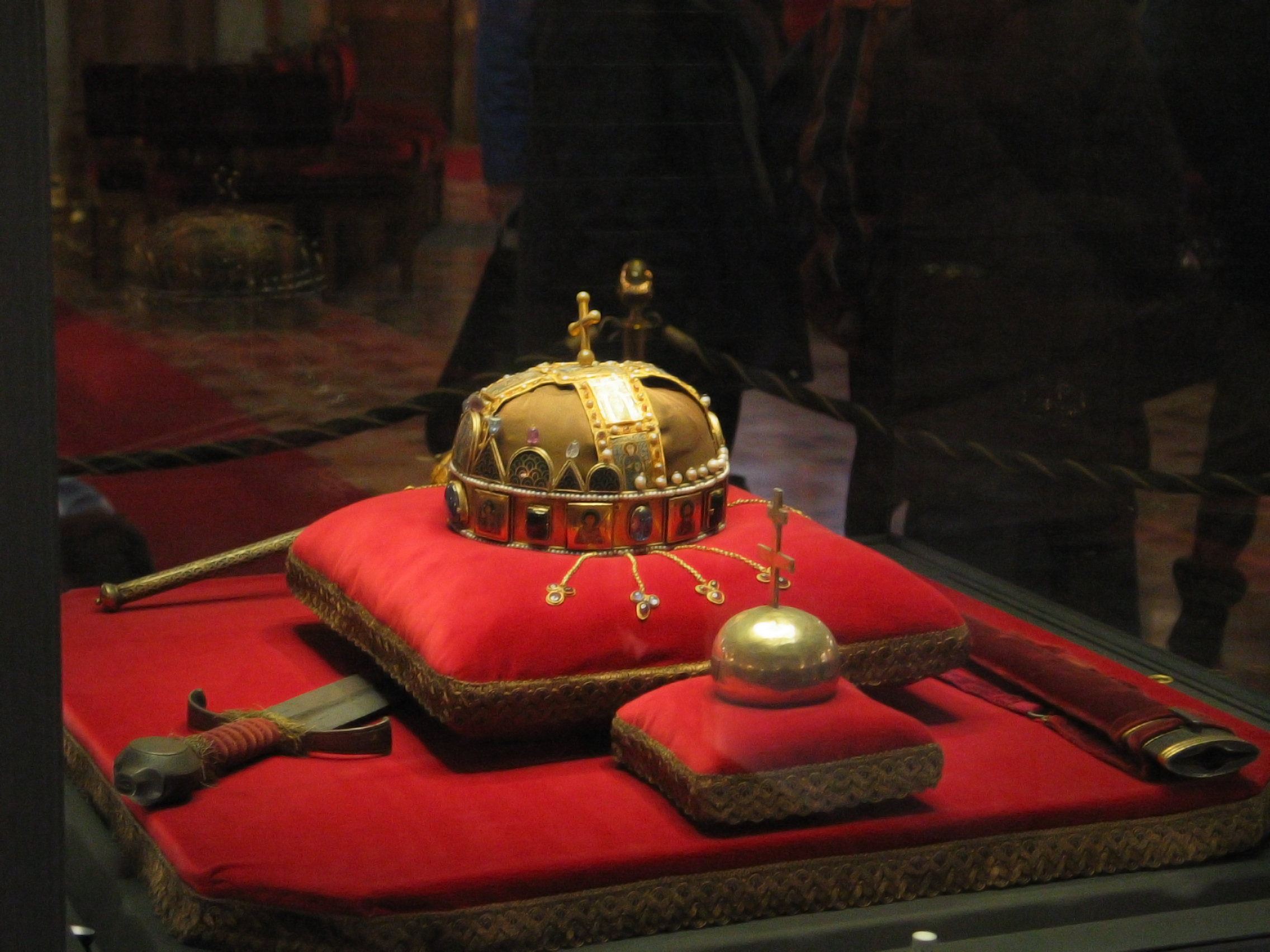 Espada, cetro, orbe y corona de San Esteban de Hungría